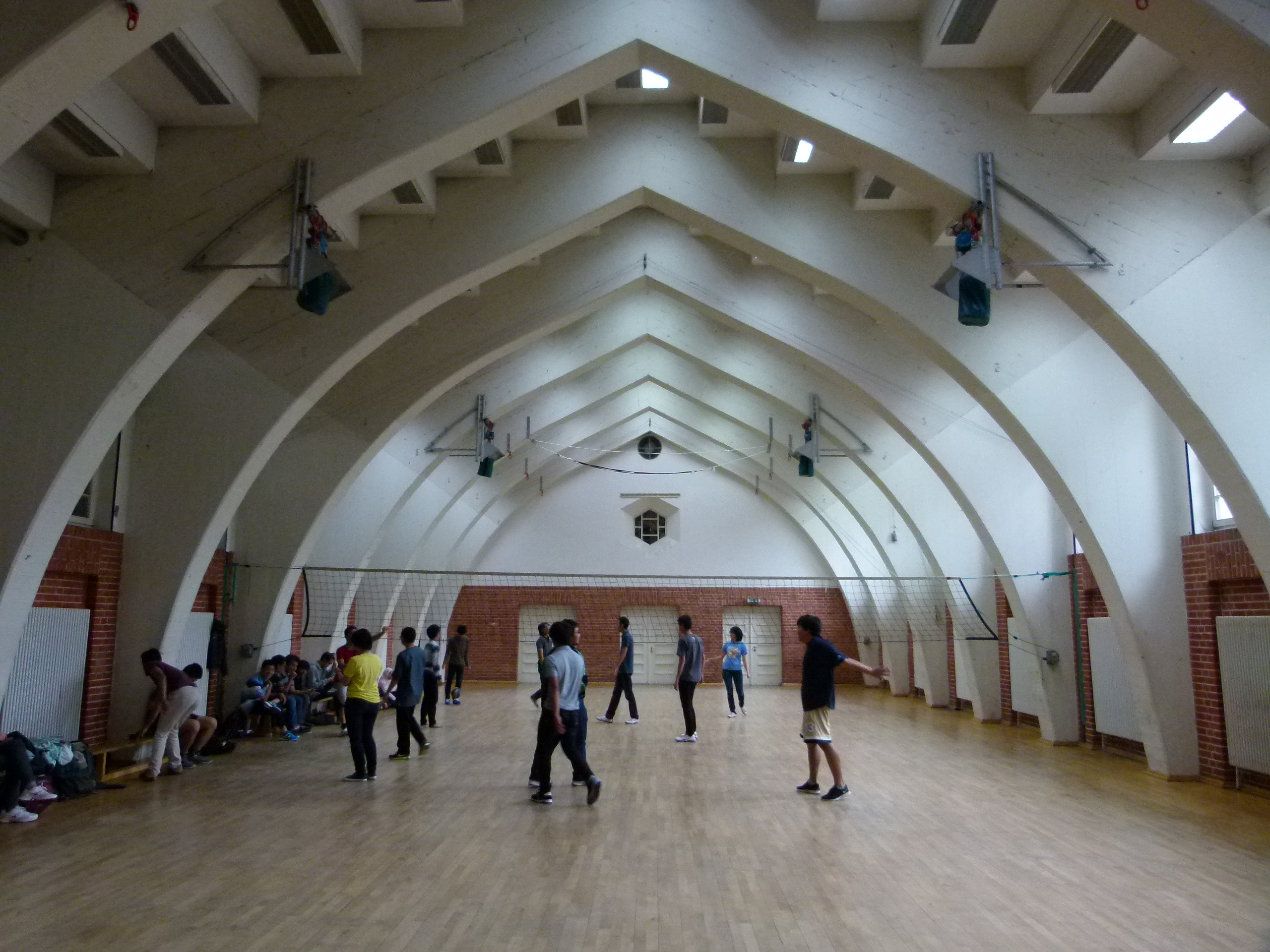 Denkmalgeschütztes Tribünengebäude des Altens Hochschulstadions in Karlsruhe, Paulckeplatz 1, heute AKK Arbeitskreis Kultur und Kommunikation, Universität Karlsruhe / KIT Karlsruher Institut für Technologie